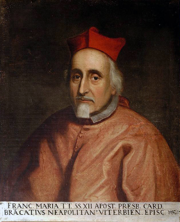 Ritratto del cardinale Francesco Maria Brancaccio (1592-1675)